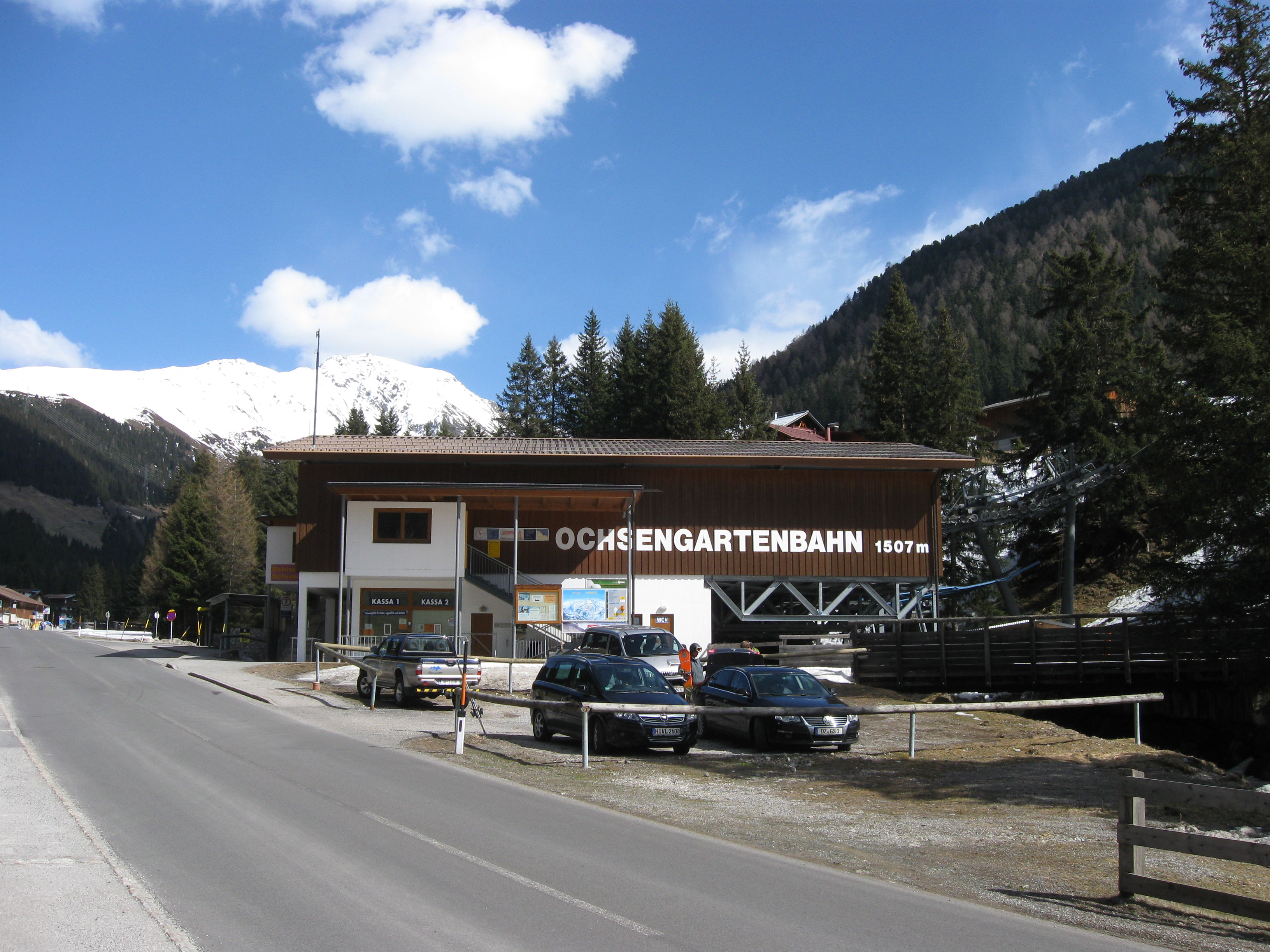 Die Talstation der auf das Schigebiet Hochoetz hochführenden Ochsengartenbahn